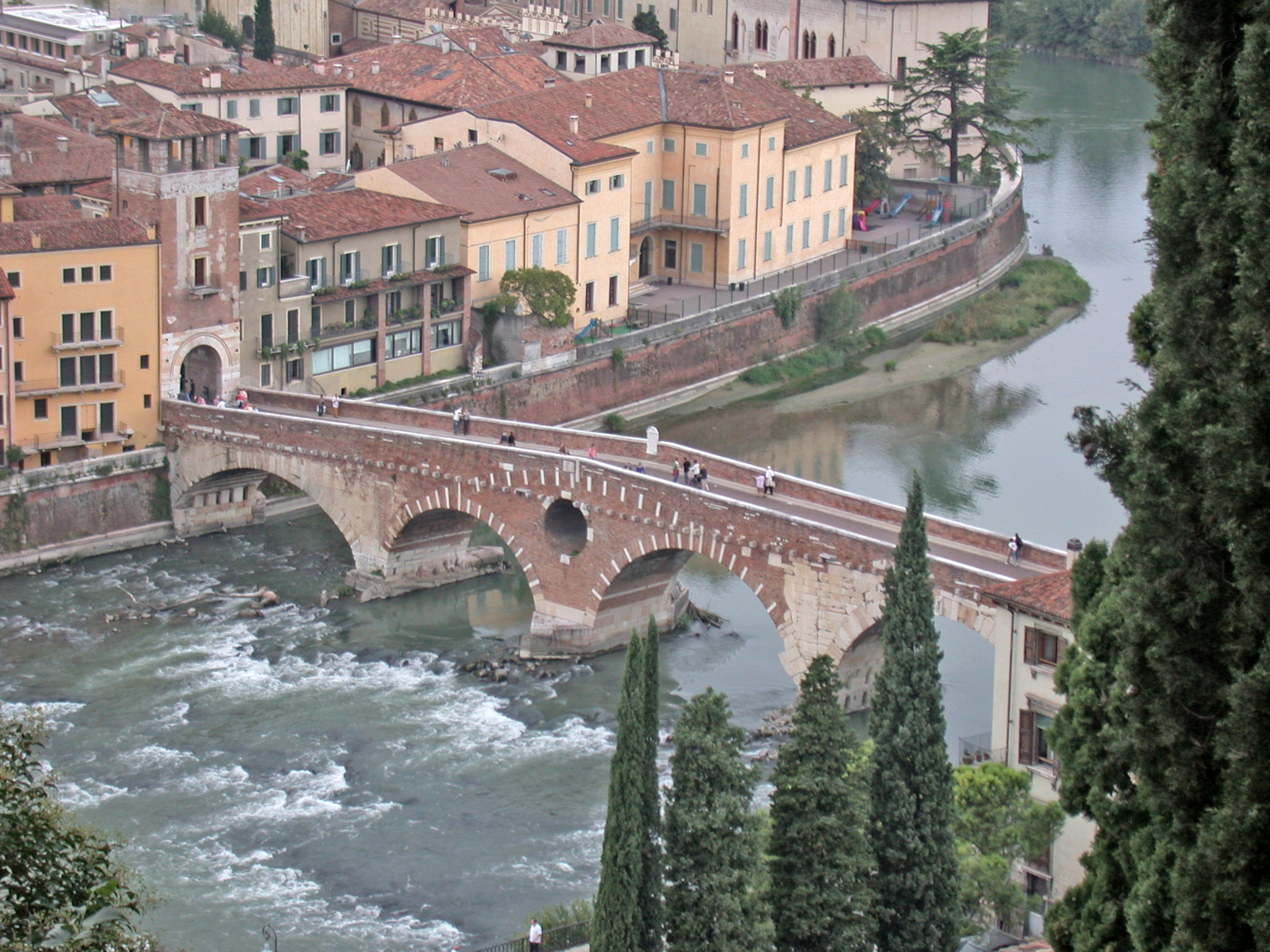 Verona, roman bridge "Ponte di Pietra", from Castel San Pietro